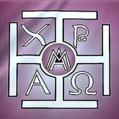 Anagrama de la Seráfica Hermandad de Nazarenos del Stmo. Cristo de la Agonía.